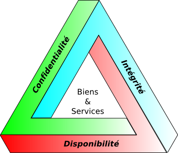 Schéma pour les critères "Confidentialité-Intégrité-Disponibilité"